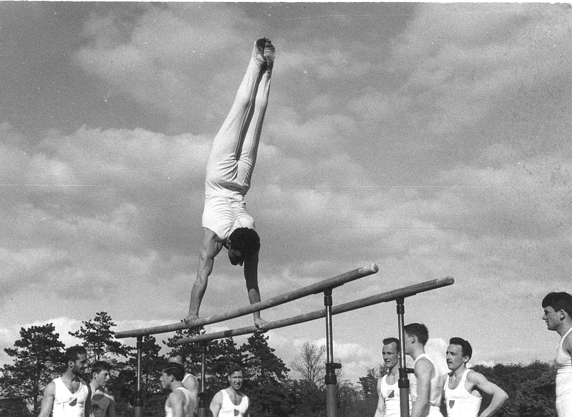 Paul Cheyrouze, premier champion de France de Trampoline